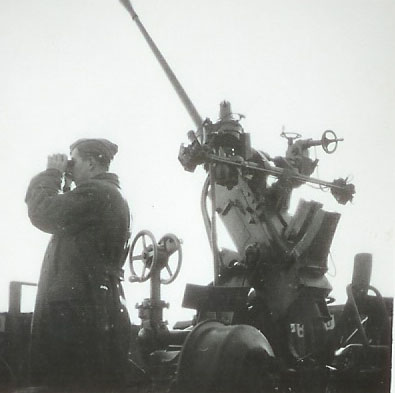 Op der Wuecht bei de Kanounen